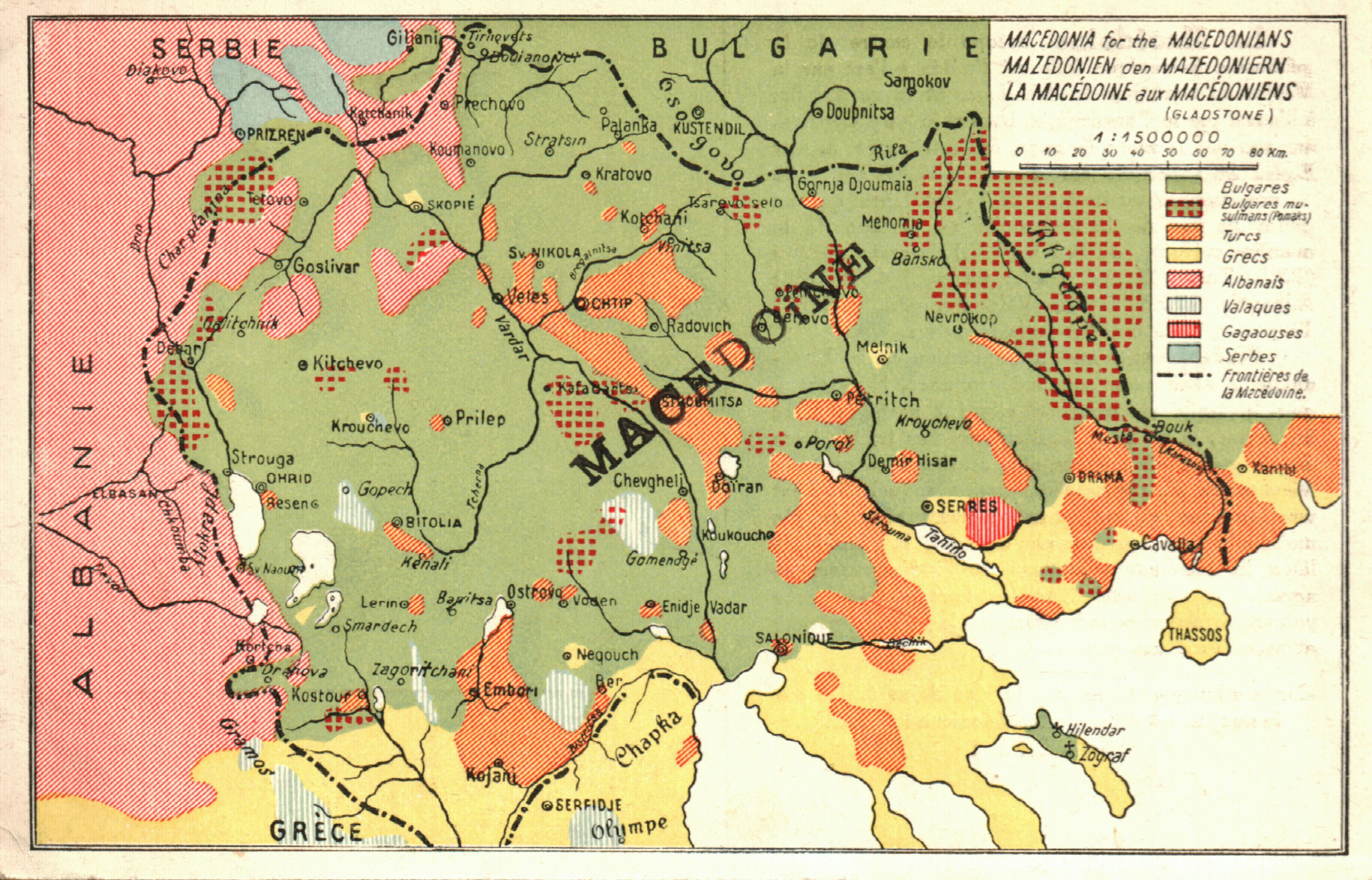 Демографска карта на Македония, показваща етническия състав на населението.